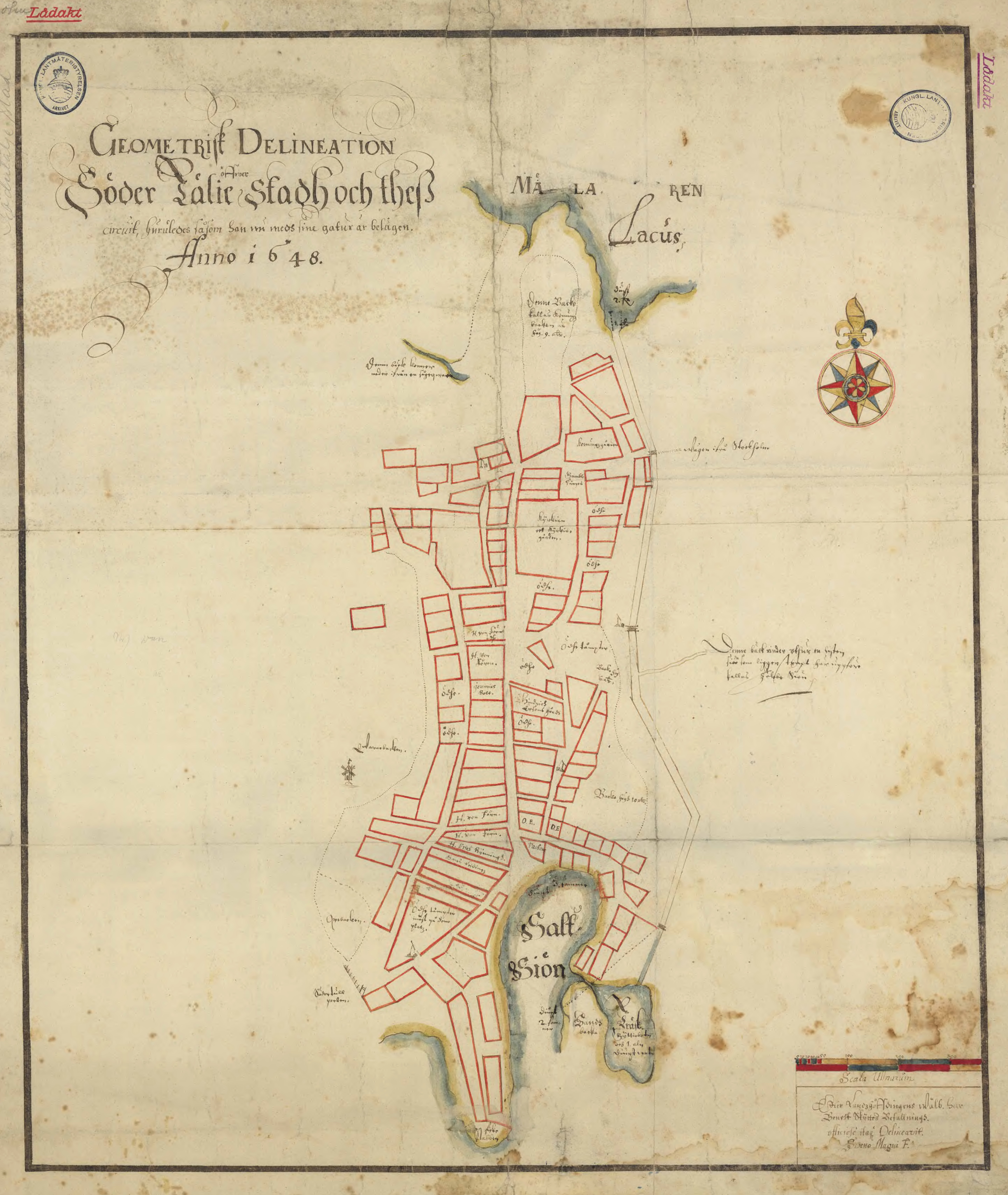 Södertälje stad